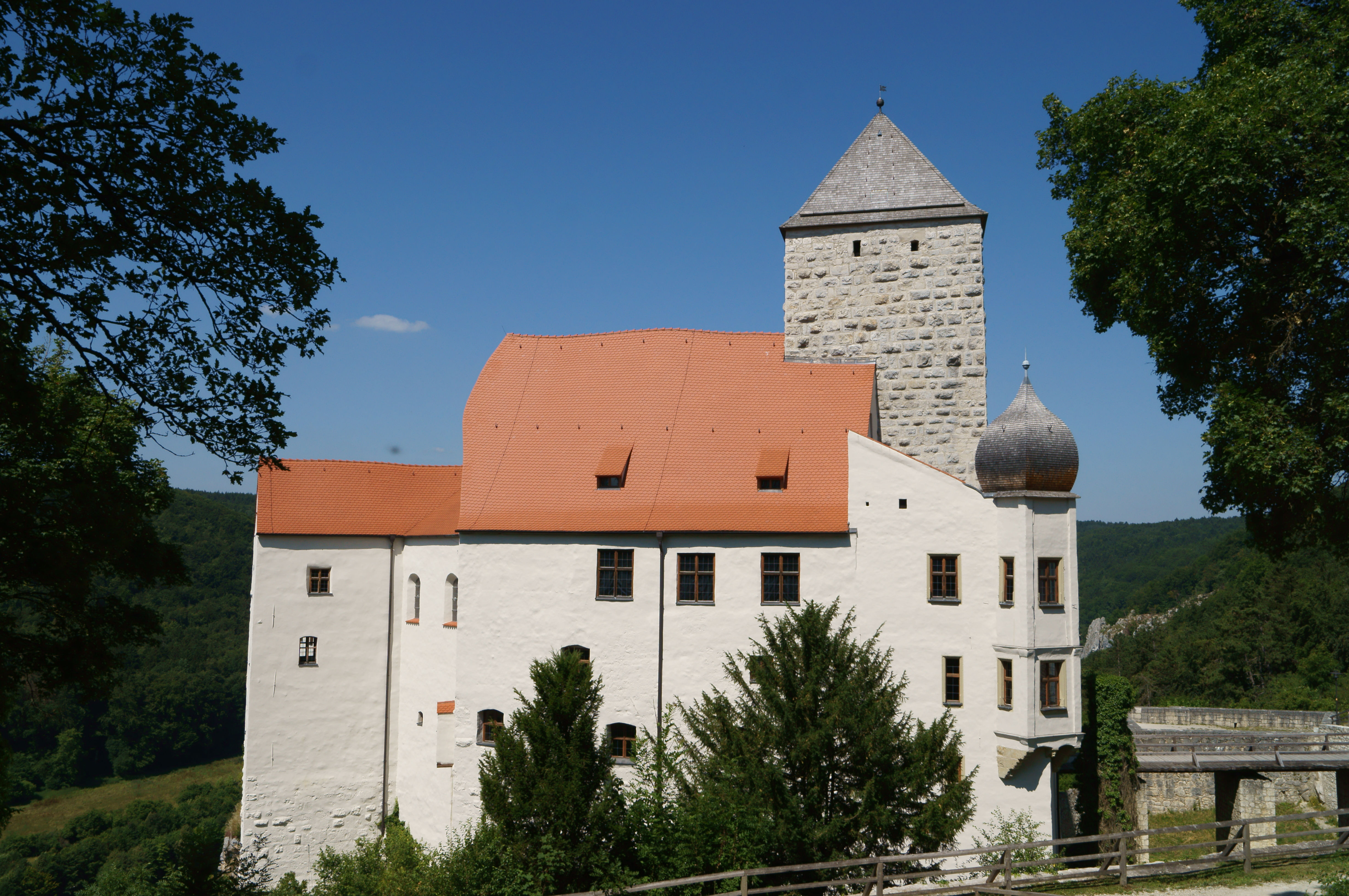 Schloss Prunn von Südöstlicher Seite gesehen